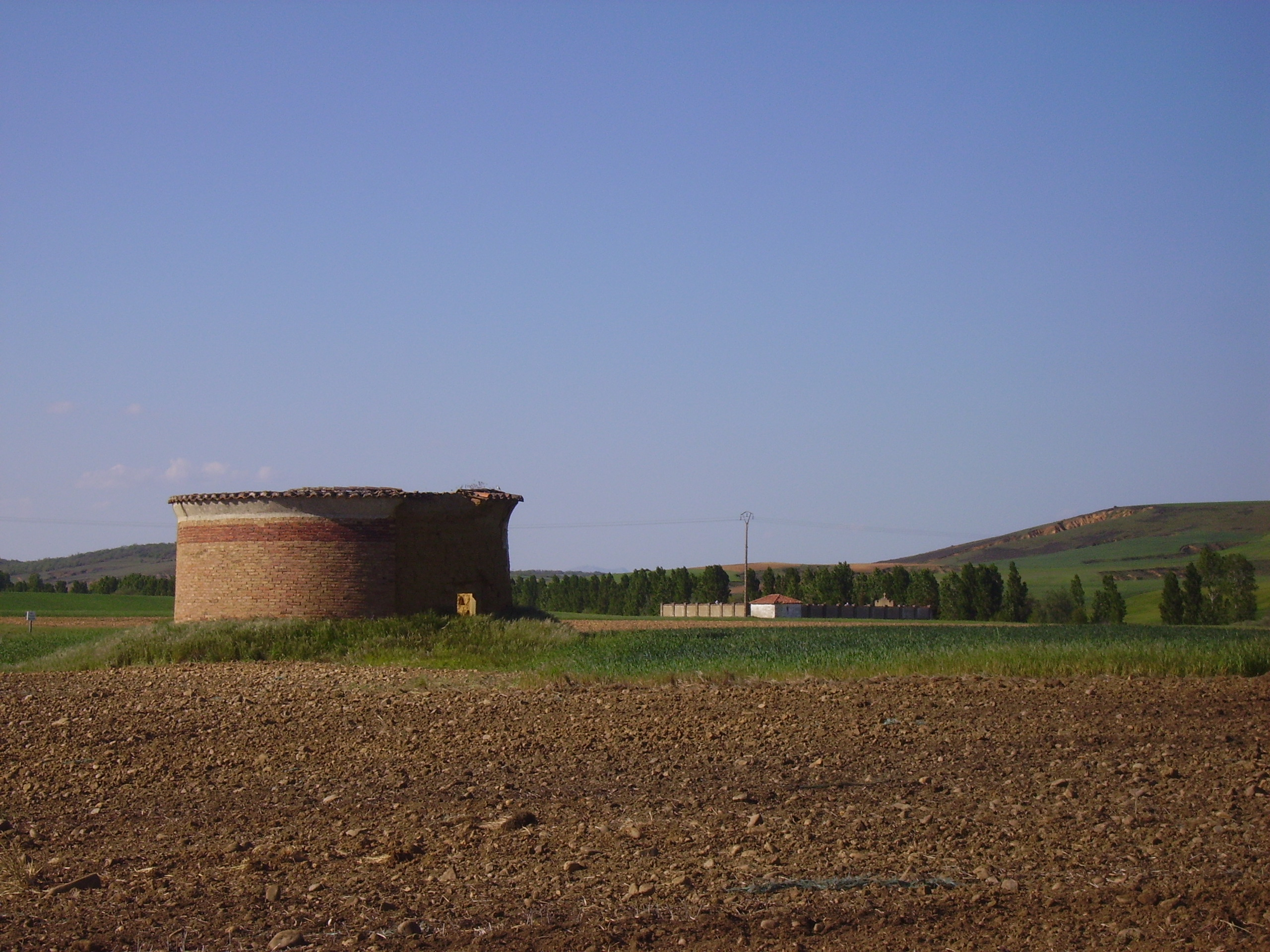 Uno de los palomares situado en Quintanilla de Onsoña